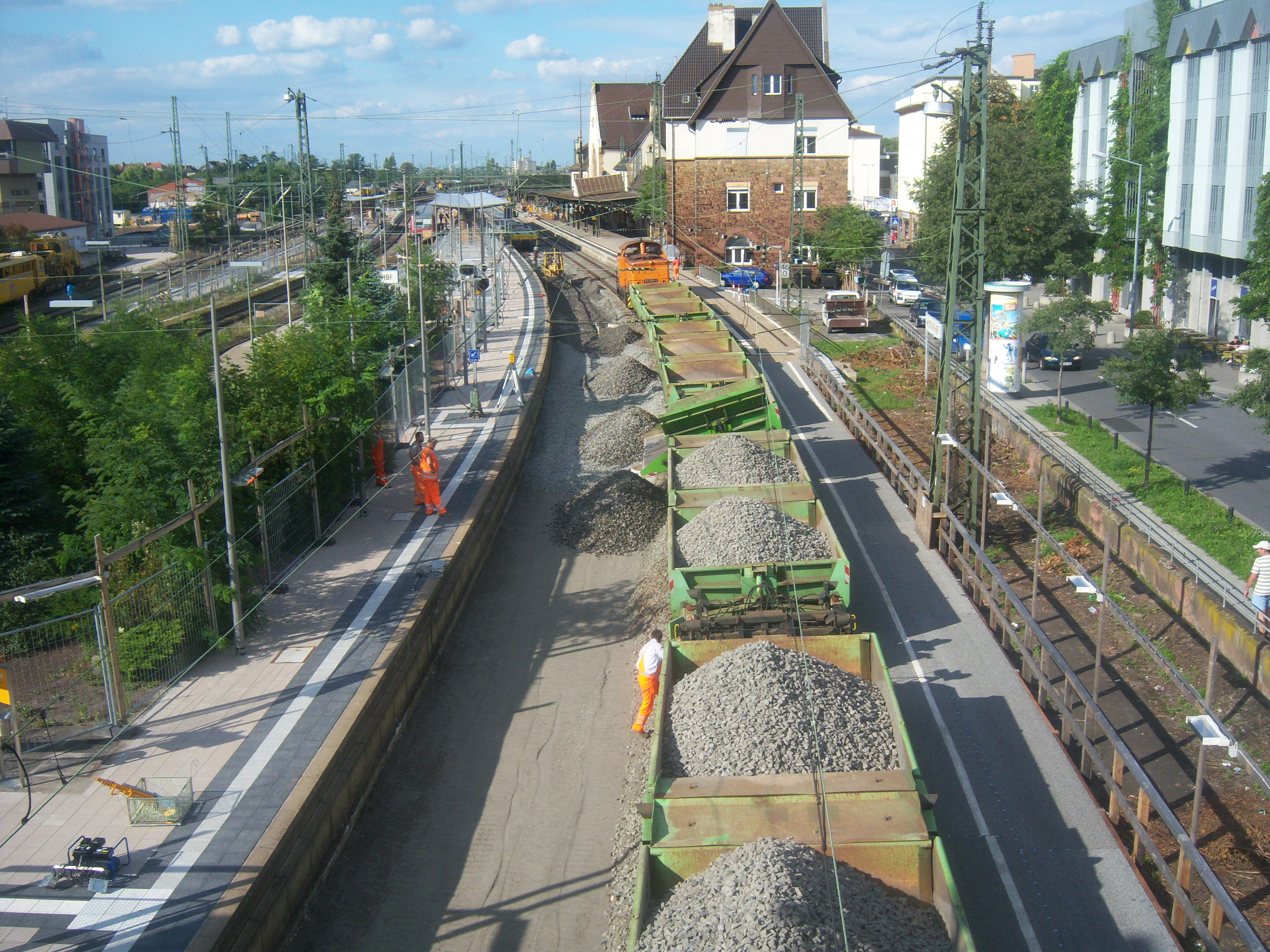 Bauarbeiten am Gleisbett-Oberbau für das Gleis 2 im Wormser Hauptbahnhof